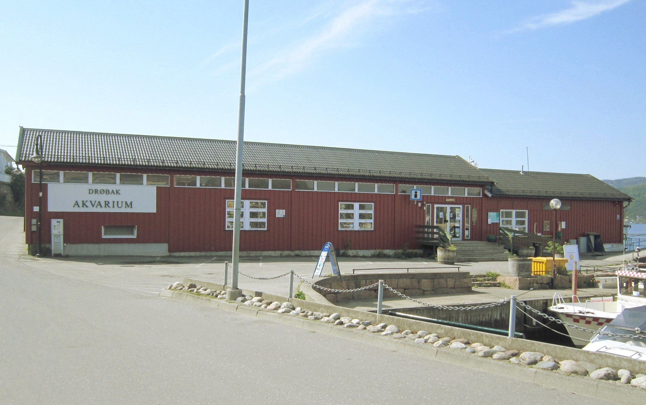 Drøbak akvarium